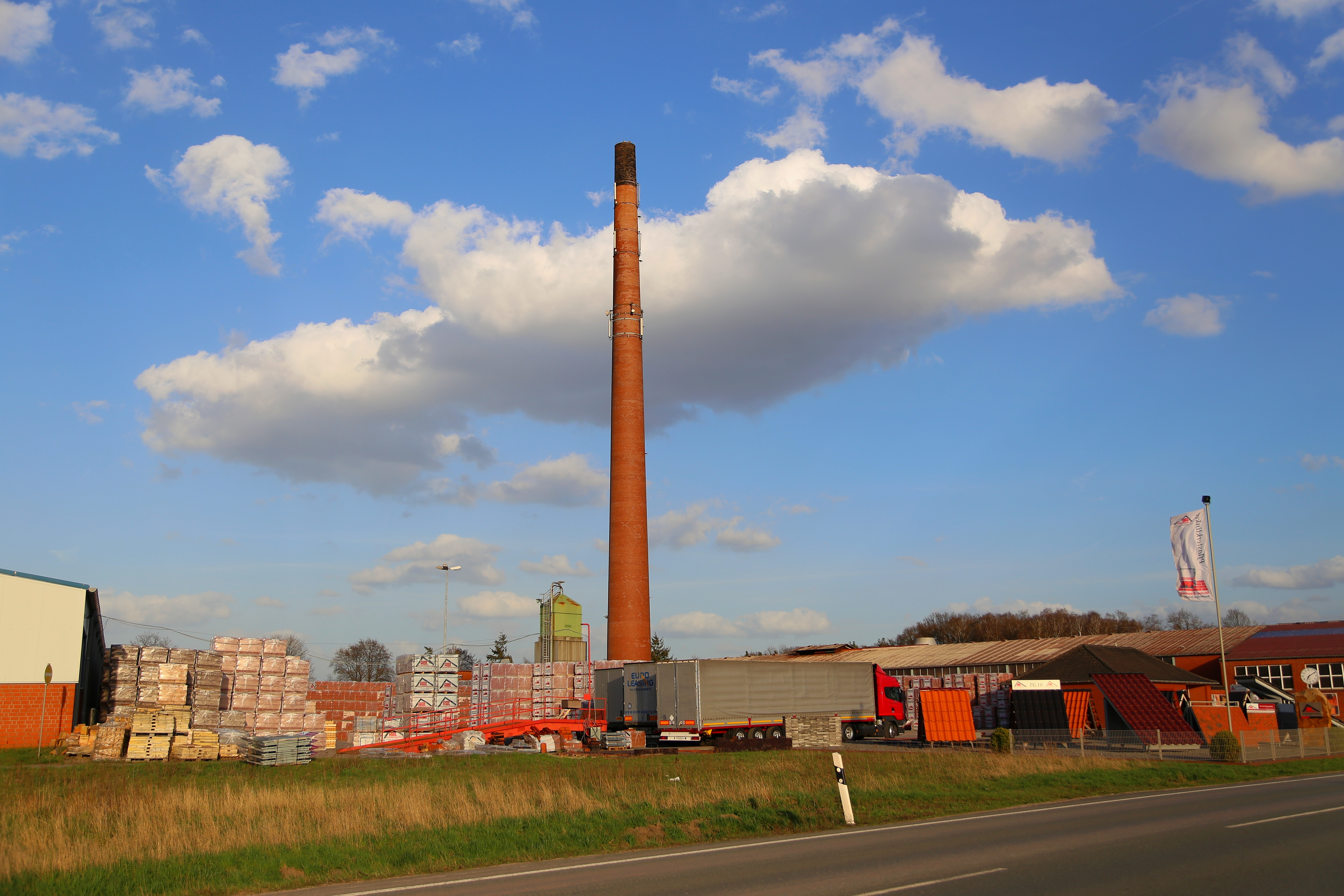 Brickyard Recker Ziegelwerk Berentelg & Hebrok OHG, a ABC-Klinkergruppe factory, in Recke-Espel, Kreis Steinfurt, North Rhine-Westphalia, Germany.